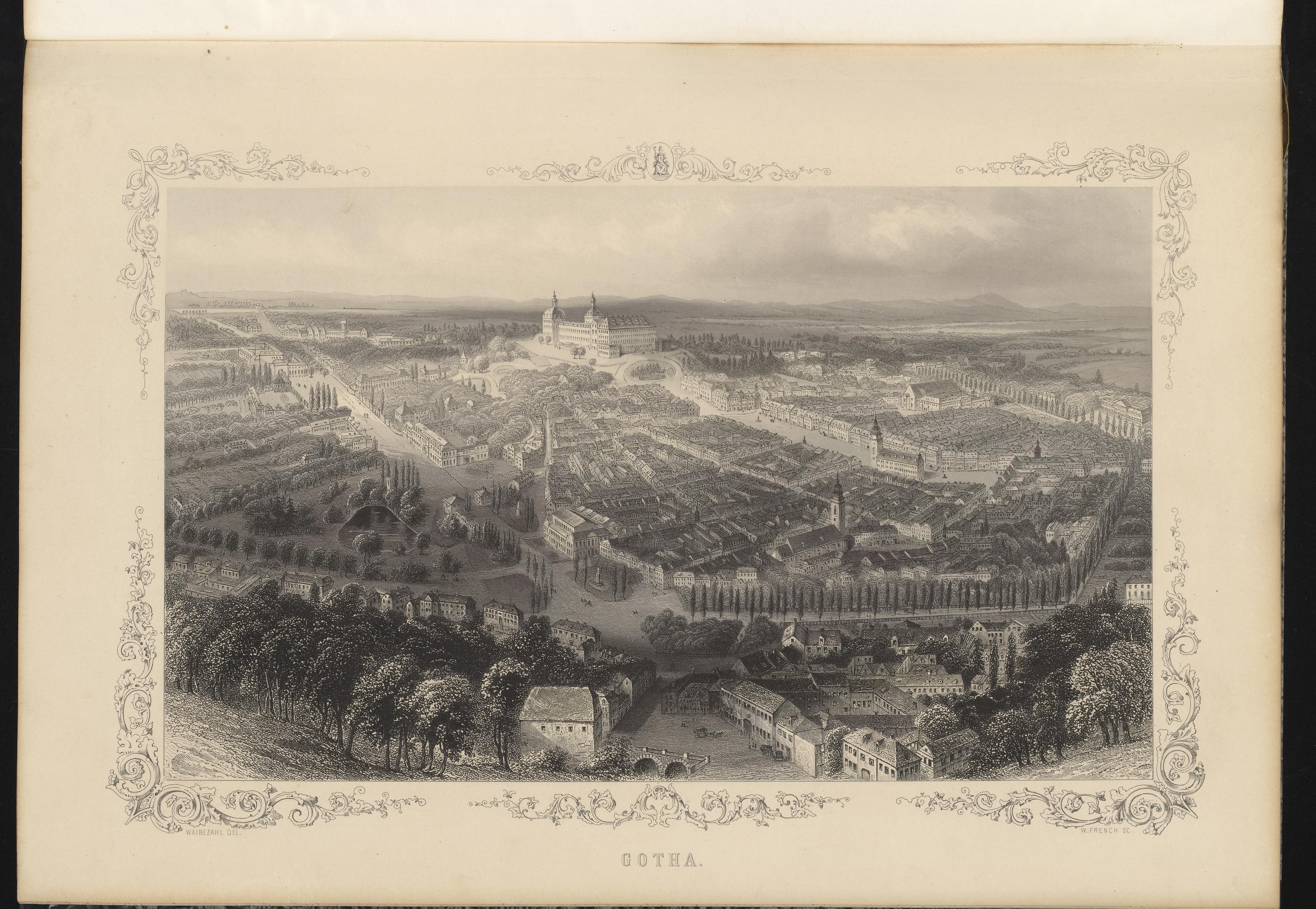 Gotha aus: Central-Europa. Panoramische Ansichten der vorzüglichsten Haupt- und Residenzstädte, der wichtigsten See- und Handelsplätze, so wie der merkwürdigsten und interessantesten Gegenden Mittel-Europas, namentlich Deutschlands; nebst historisch-geographischen Text Englische Kunst-Anstalt von A. H. Payne, Leipzig und Dresden